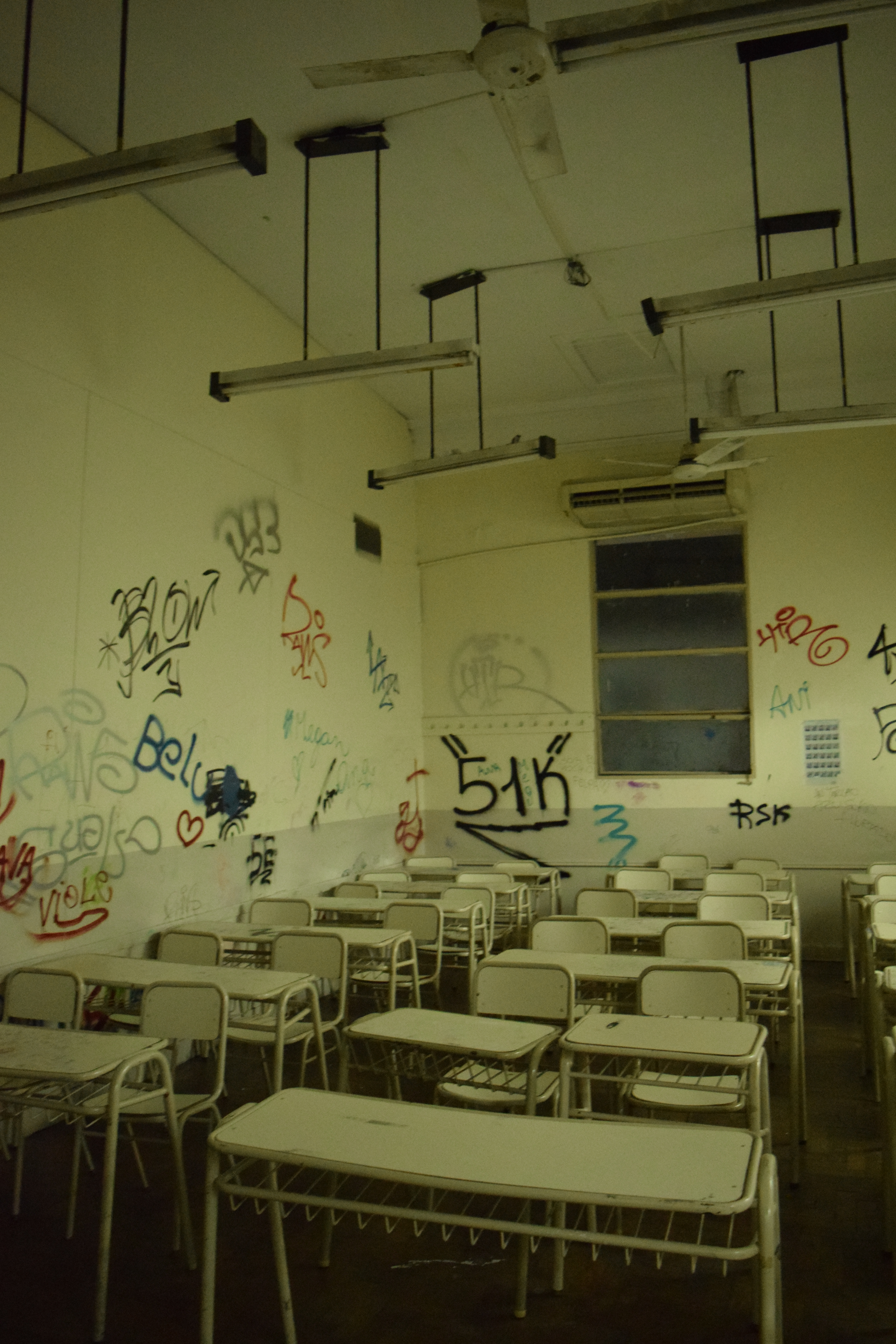 Aula de la Escuela Superior de Comercio Carlos Pellegrini dependiente de la Universidad de Buenos Aires.